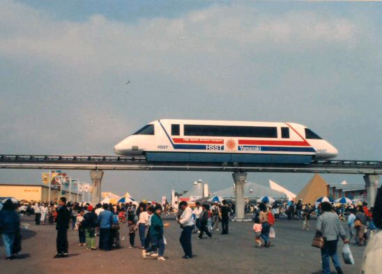 '88さいたま博覧会 ヤマザキHSSTステーション